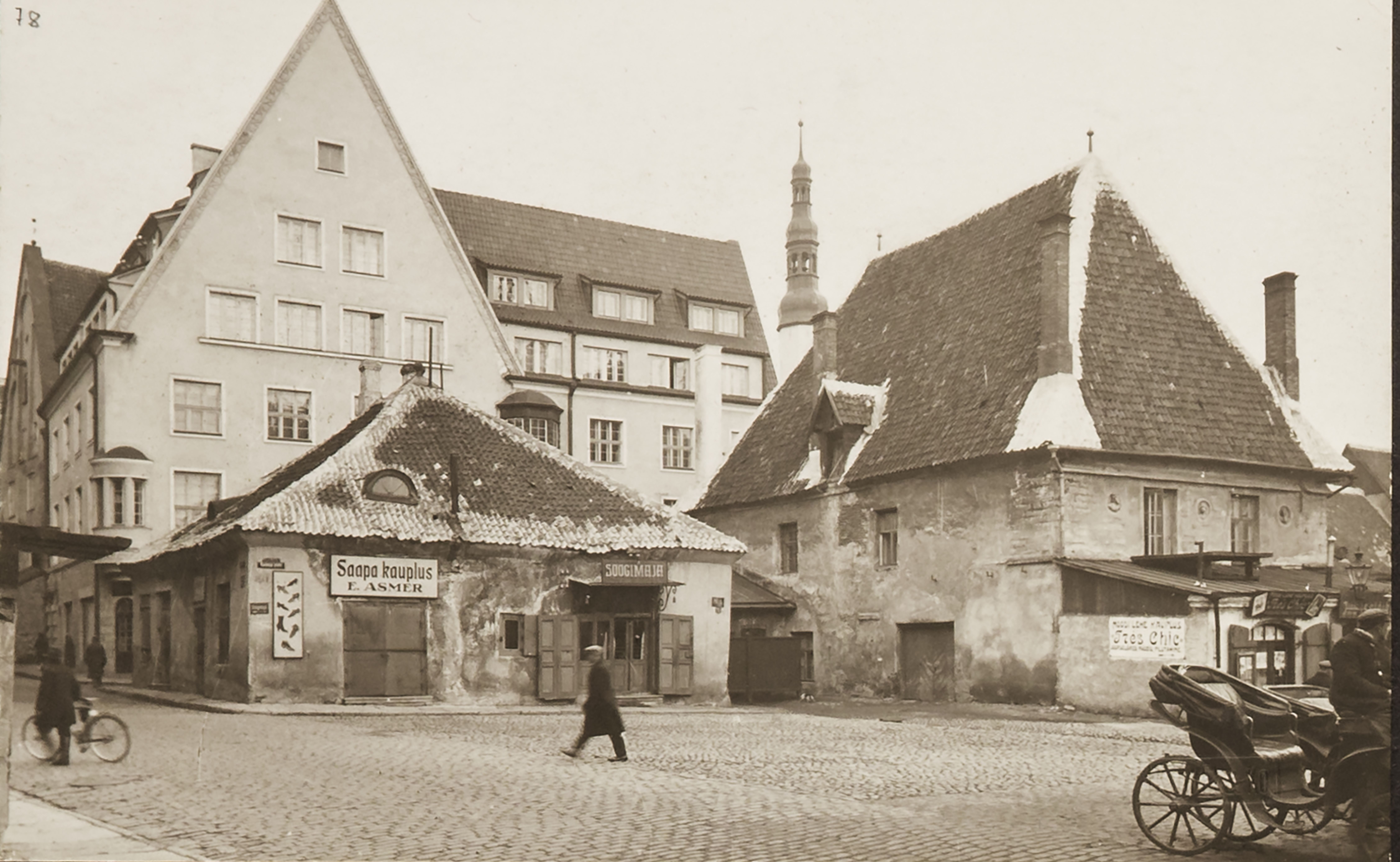 Vaekoda juurdeehitustega